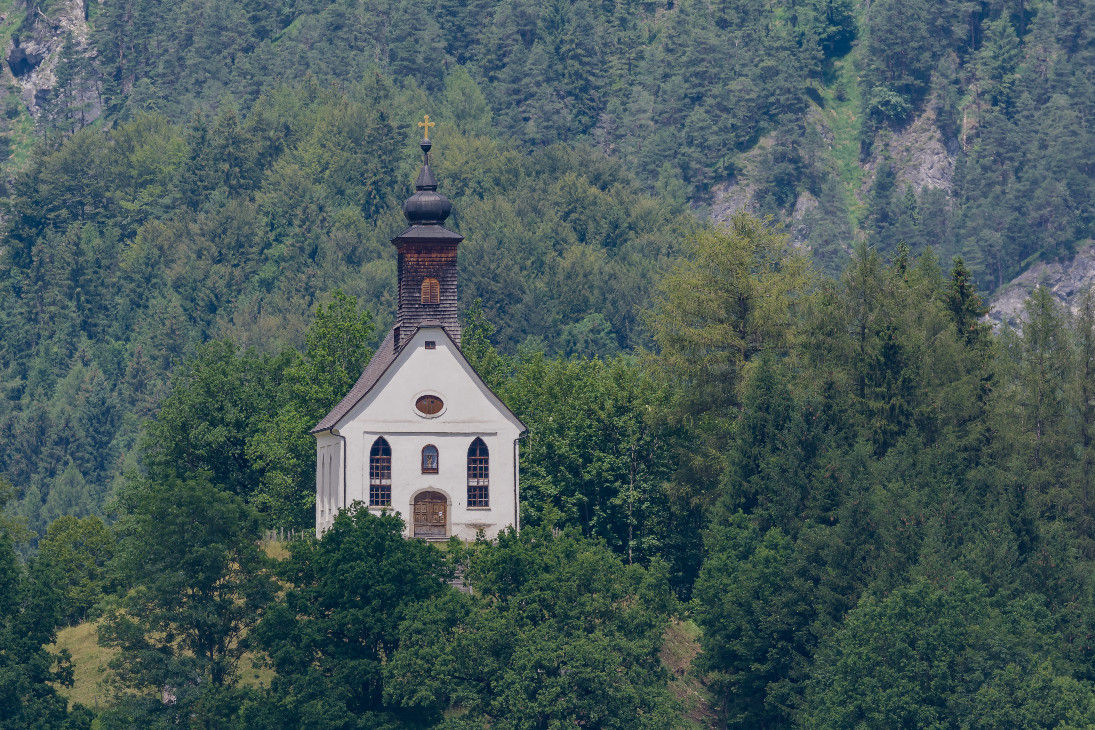 Die Kalvarienbergkapelle befindet sich auf einem markanten Hügel (Kalverienberg, 667 m) im Windischgarstner Tal.